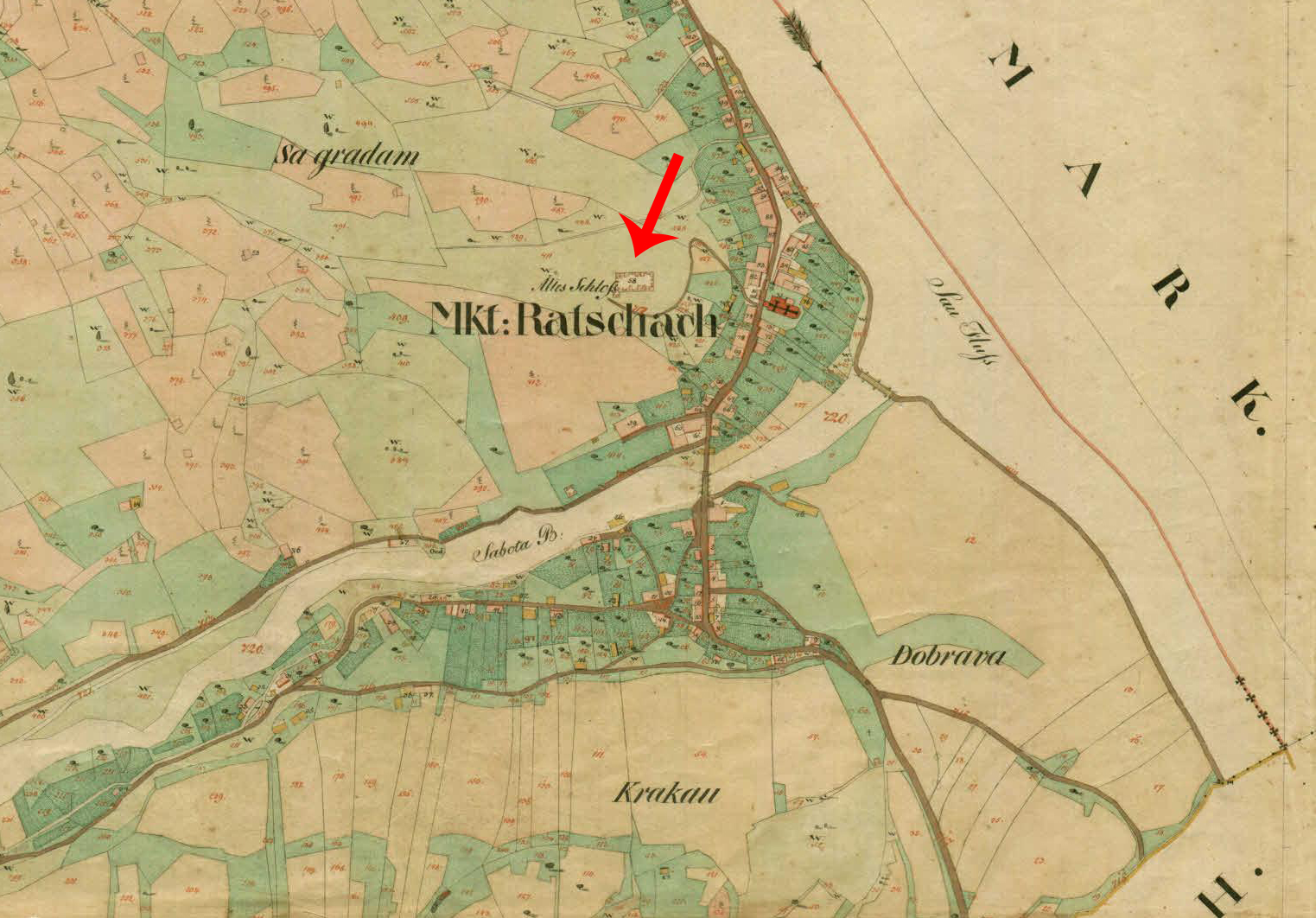 Franciscejski kataster za Kranjsko, 1823-1869